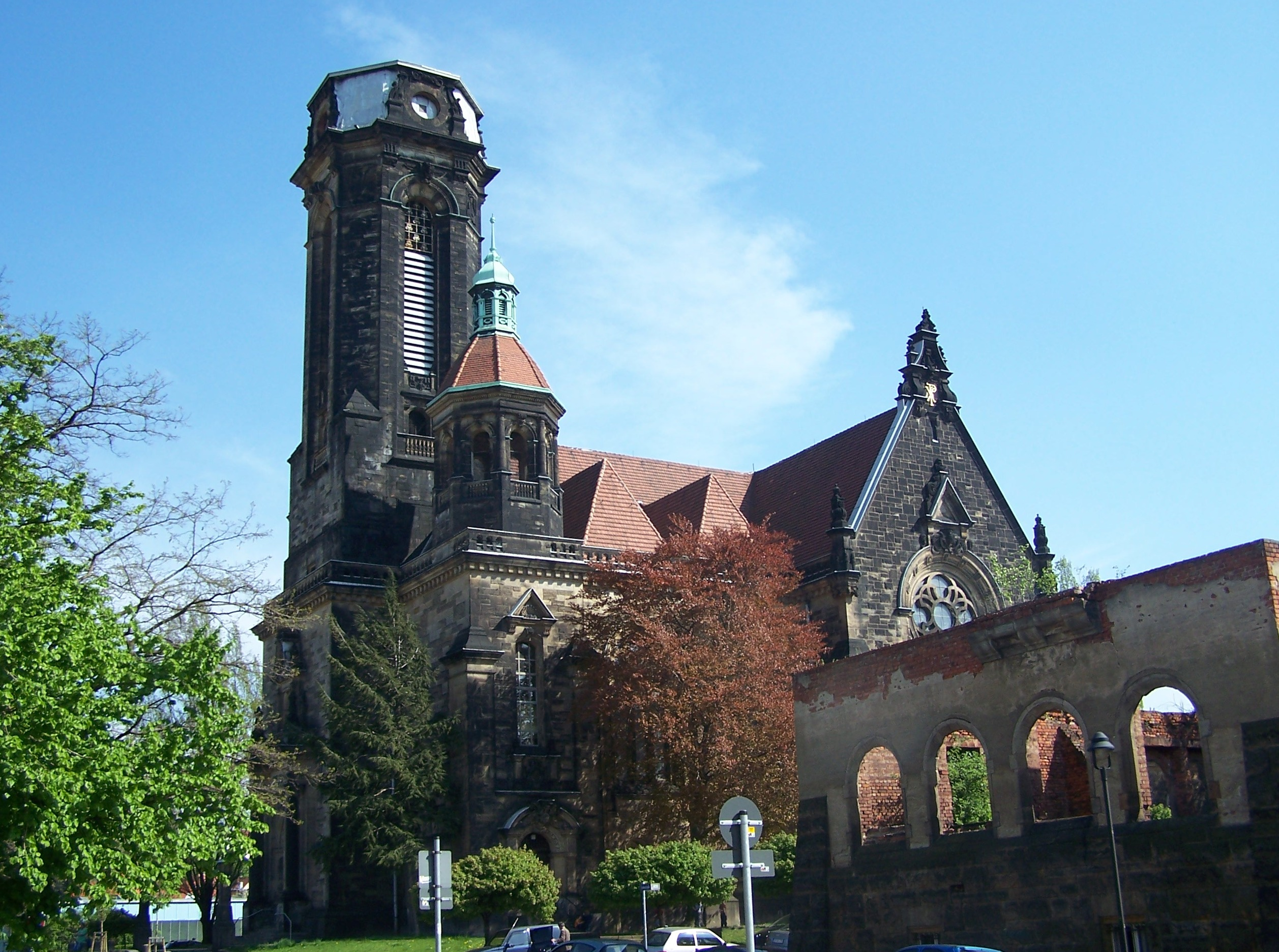 Lukaskirche und Kirche des ehemaligen Pfarrhauses (Lukasplatz 4) von der Lukasstraße aus gesehen